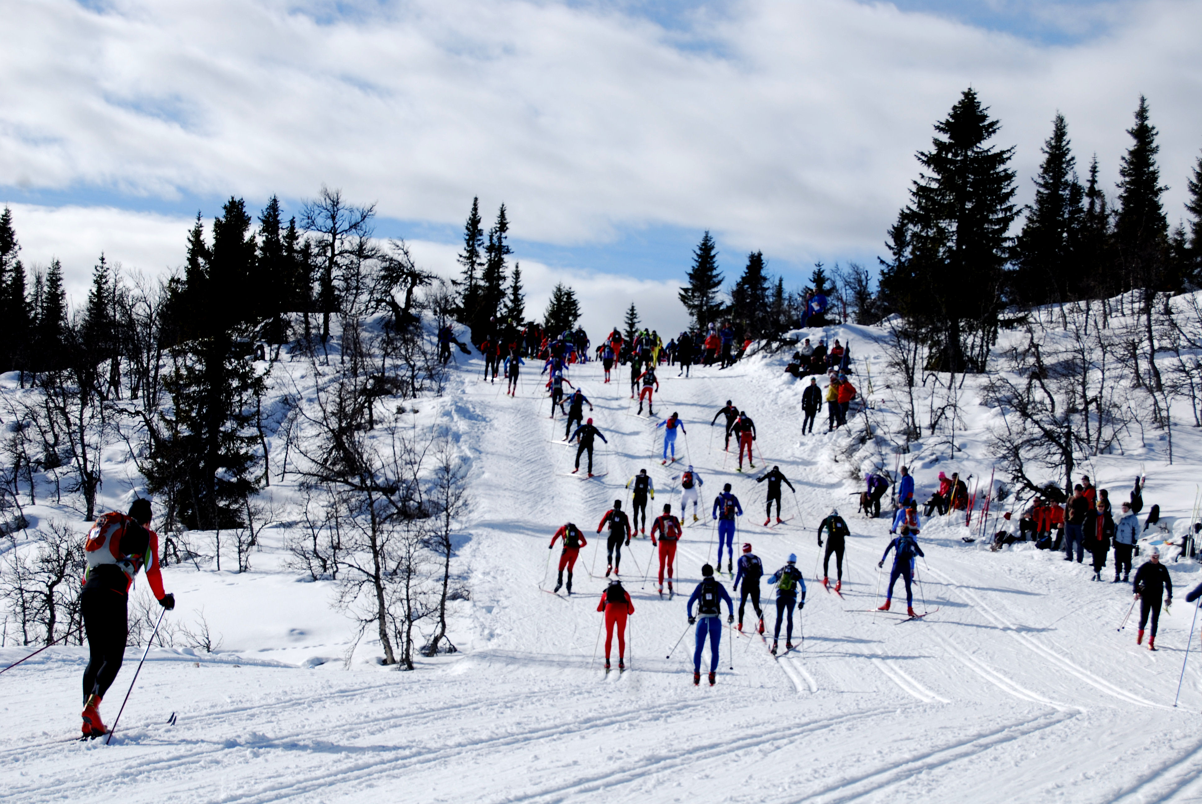 Bildet er tatt 20. mars 2010 ved Midtfjellet ca 30 km ut i løypa, før den kanskje hardeste stigningen.